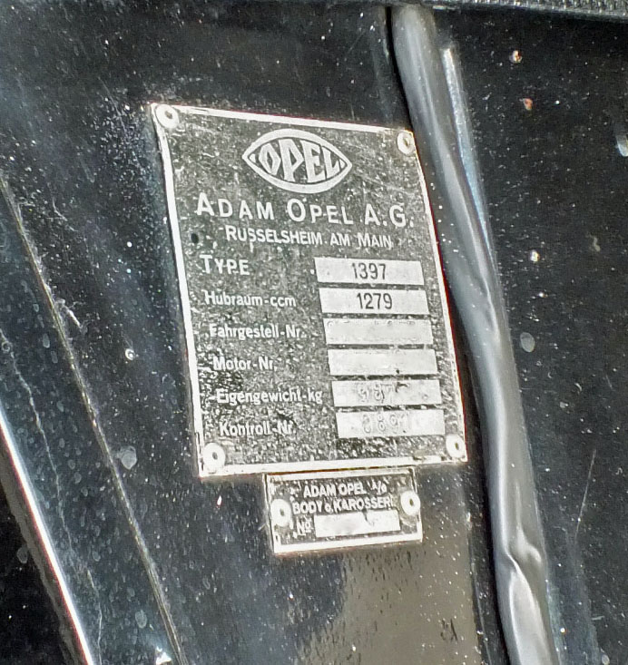 Opel 1,3 Liter Typenschild